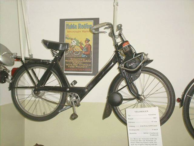 Velosolex S3800, Motorradmuseum Ibbenbüren.